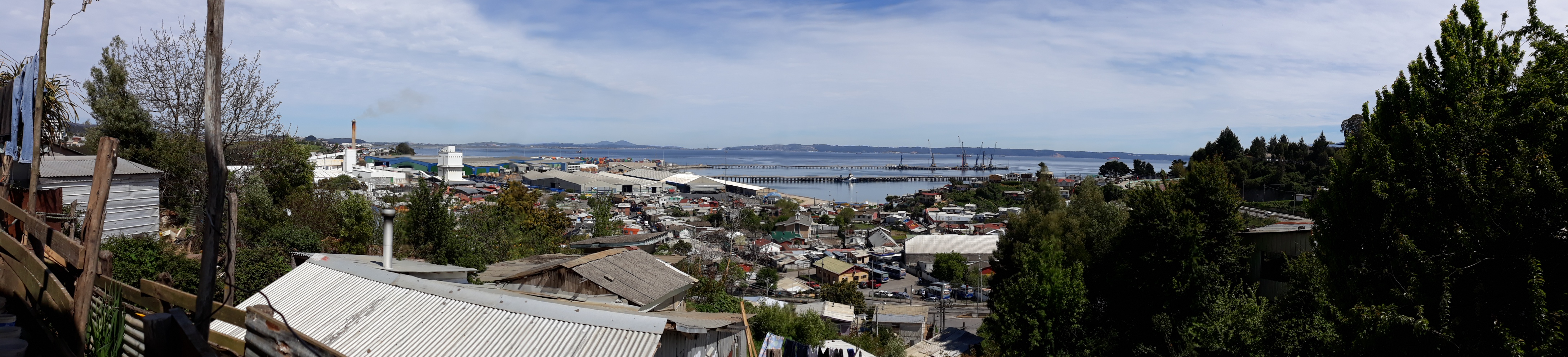 Panoramica de lirquen